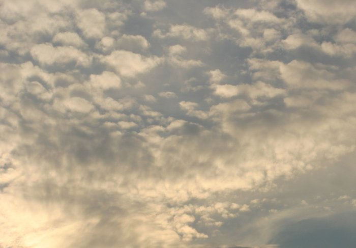 Alto cumulus